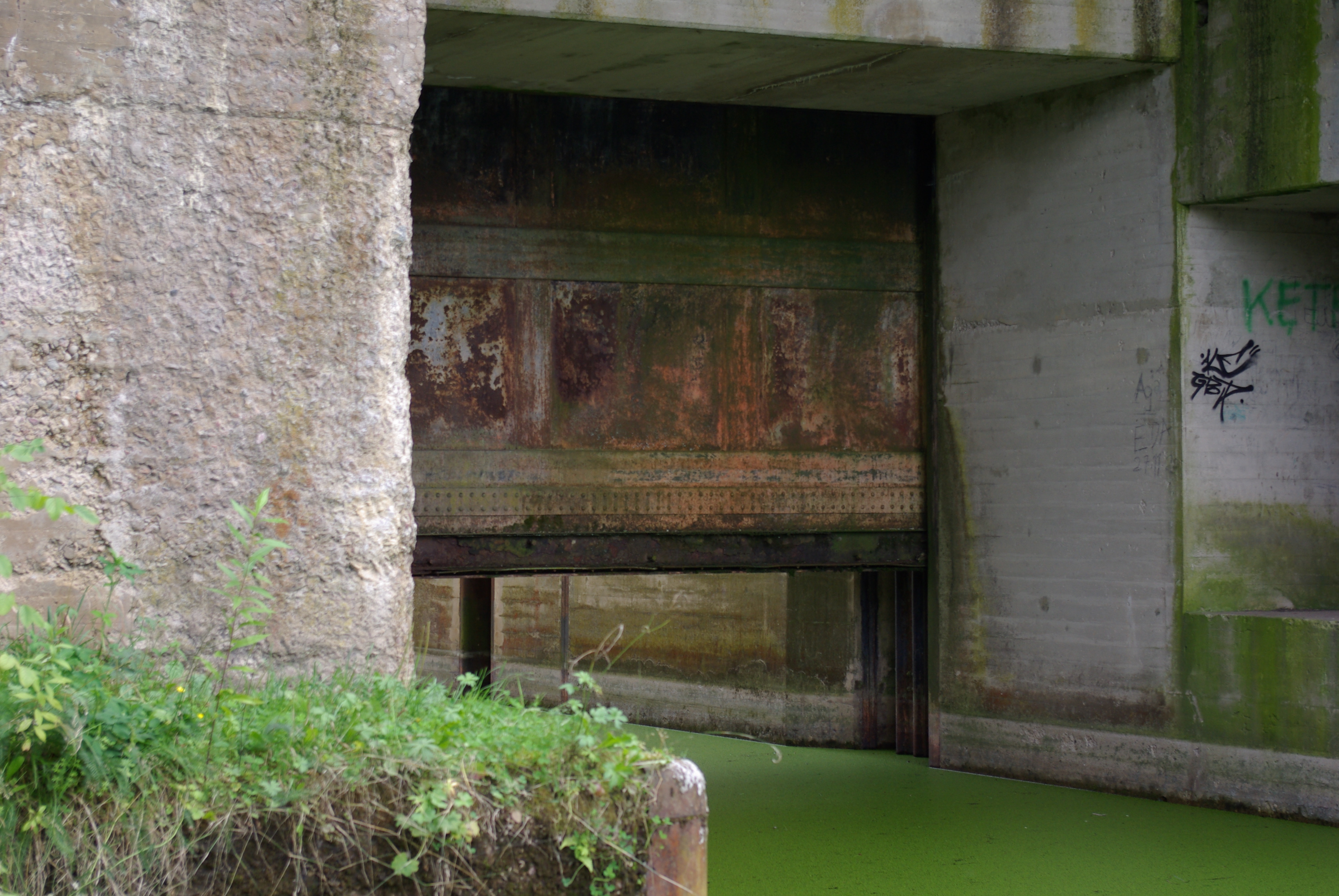 Kanał Mazurski, Śluza Piaski (Guja)